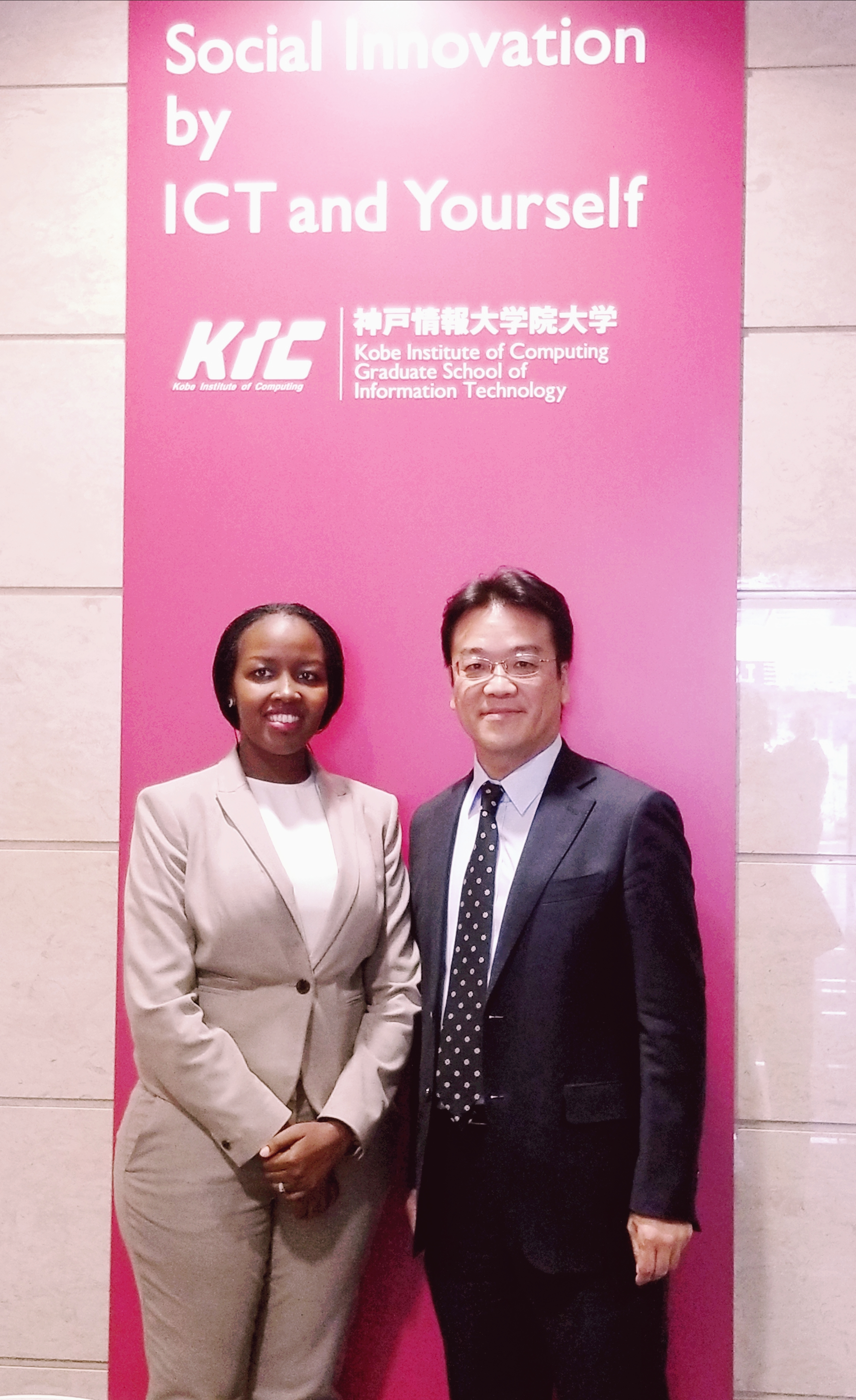 ＩＣＴ ルワンダ大臣